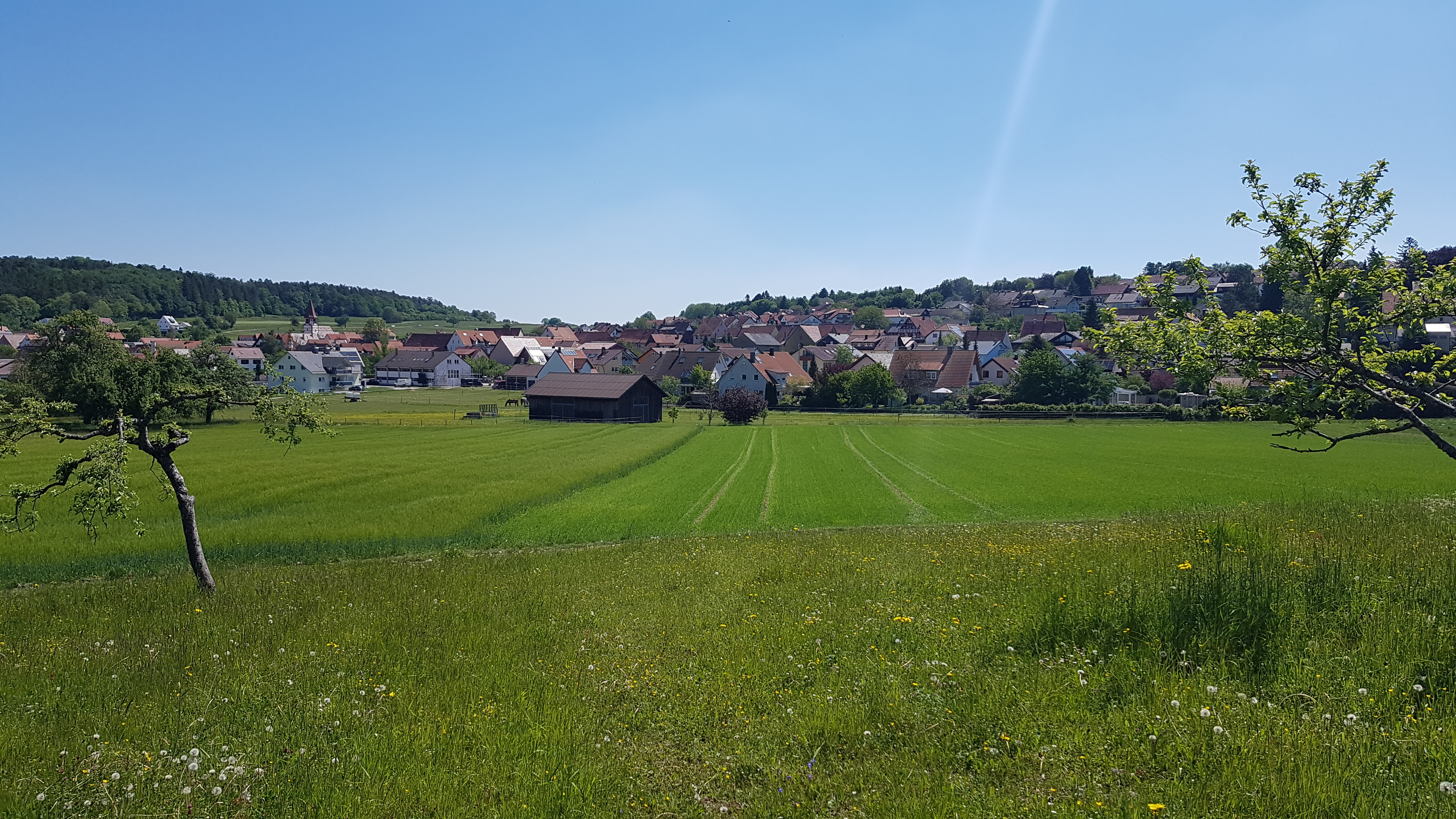 Ortsansicht von Westen